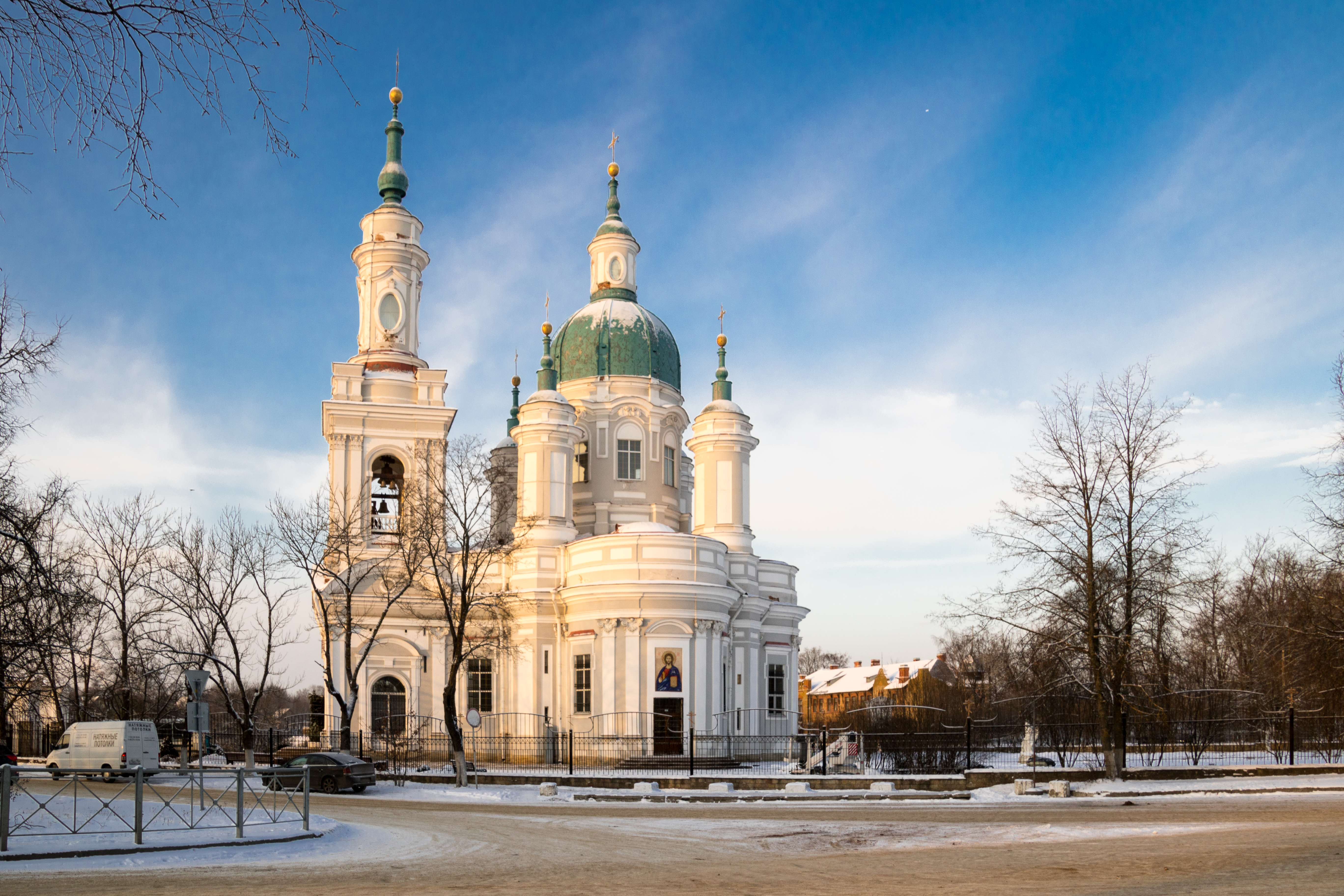 Собор Екатерининский: площадь Рыночная (бывш.), Кингисепп, Кингисеппский район, Ленинградская область